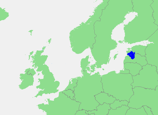 Golf van Riga